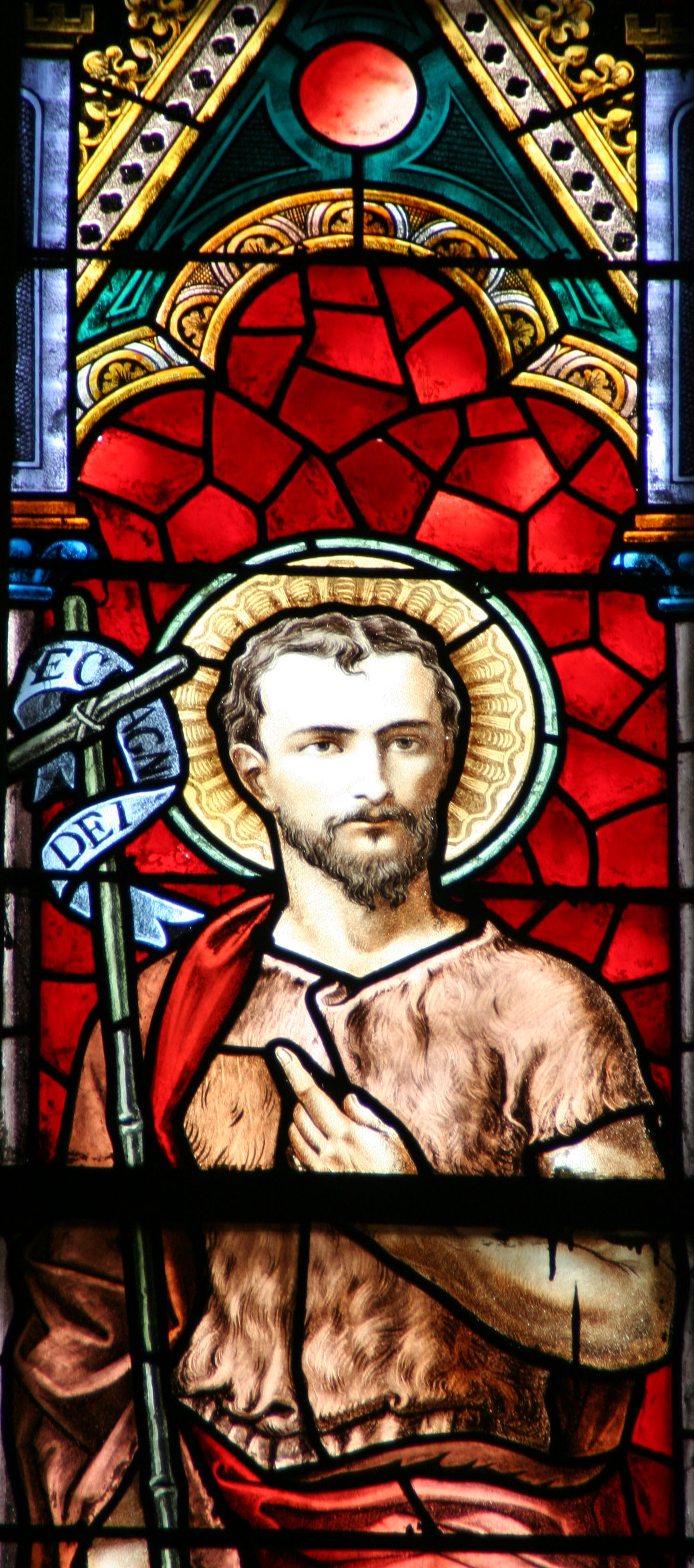 Kierch Zowaasch eng vun de Fënsteren.